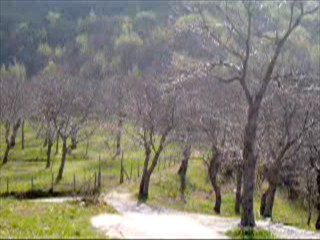 Ecco via Croci,il tragitto che si immette nella mulattiera del Faliesi.